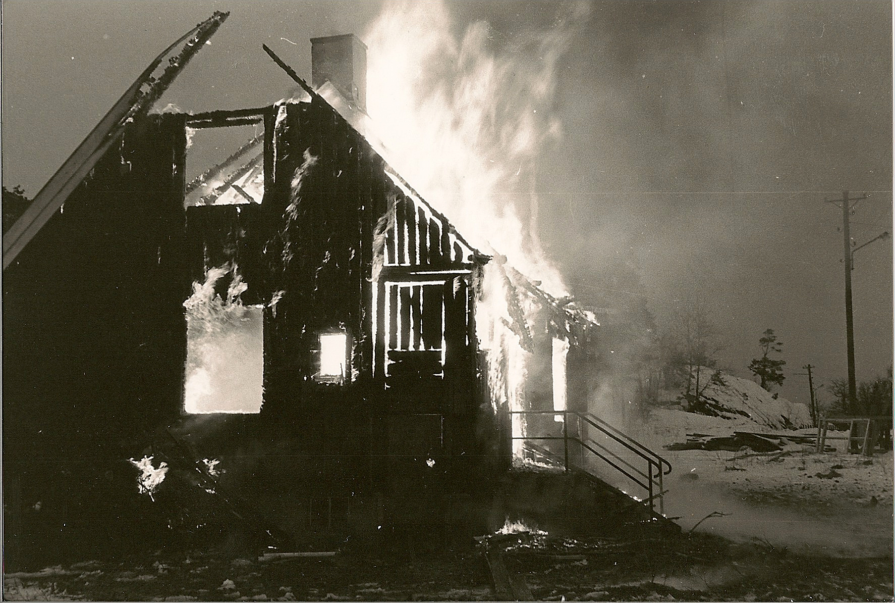 Stensholms säteri 1905.